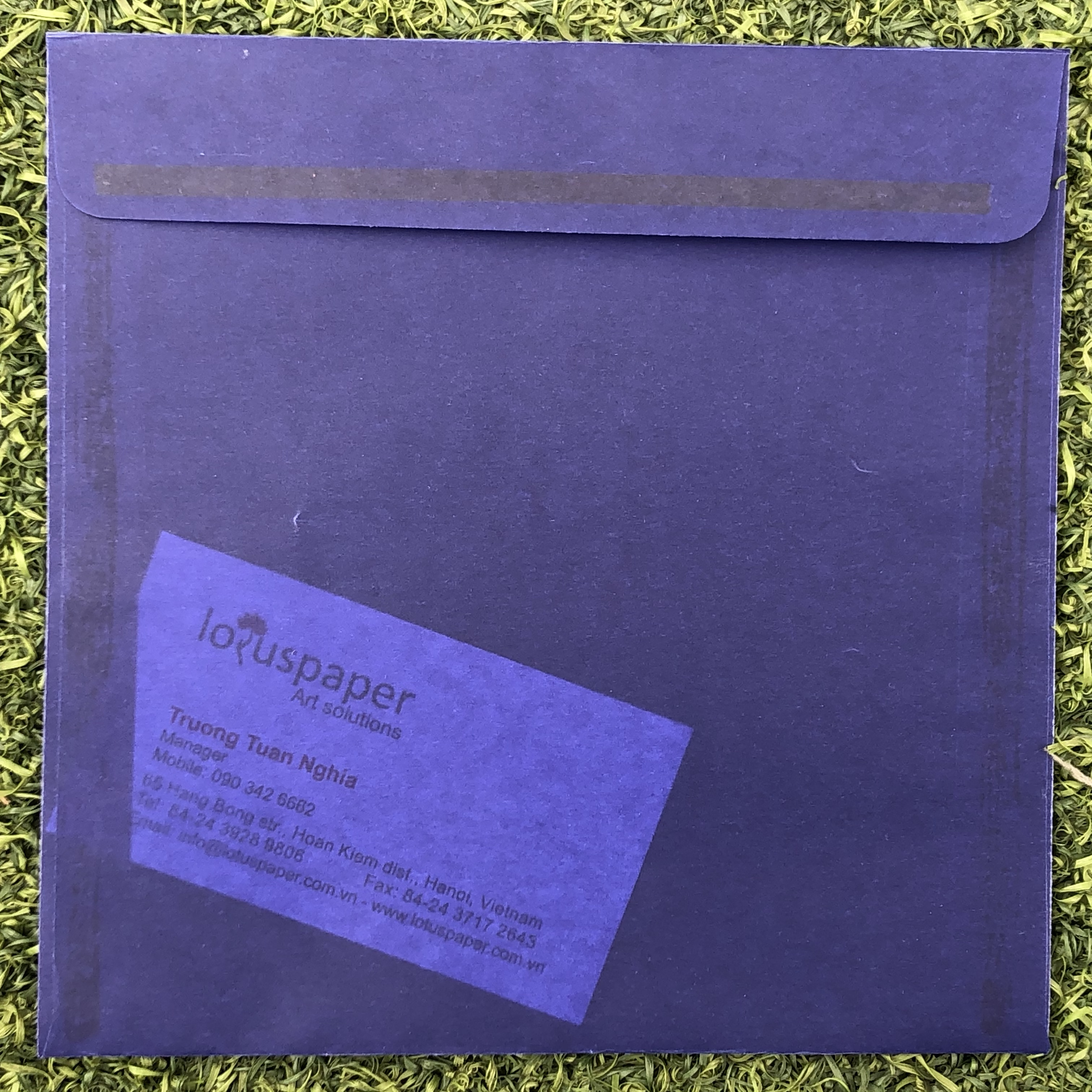 Phong bì giấy can mỹ thuật với băng dính 2 mặt và danh thiếp